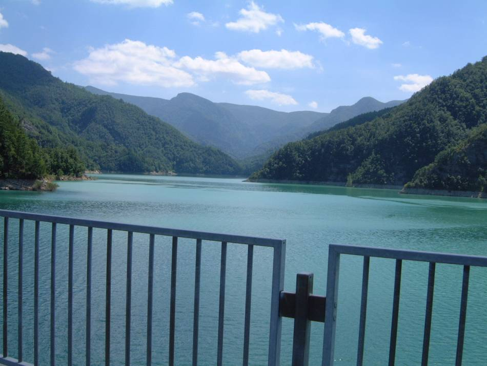 Je suis l'auteur de cette photo prise à Ridracoli en 2004